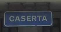 Stazione ferroviaria di Caserta, cartello indicatore.